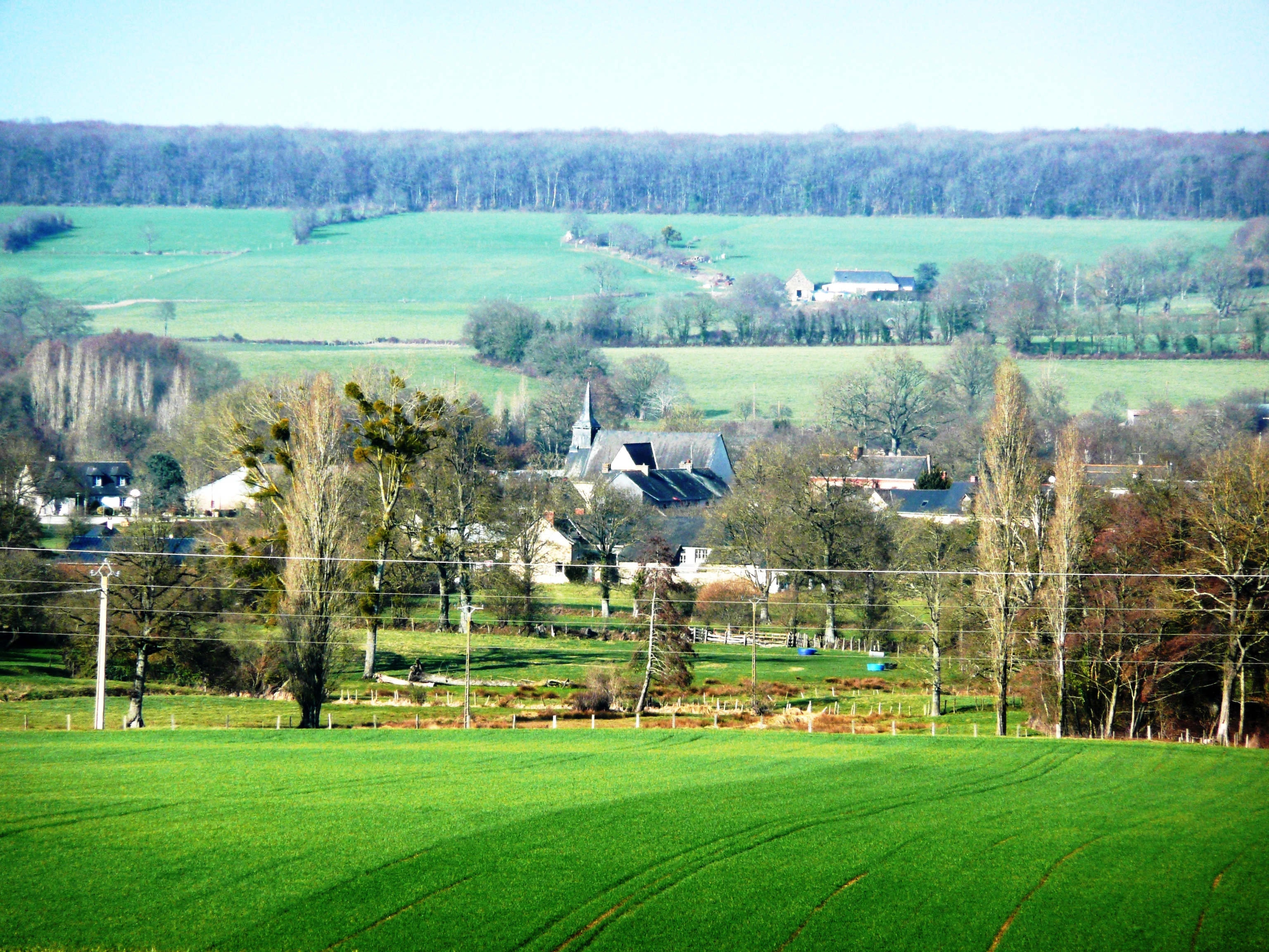 Chapelle Hullin - Vue générale